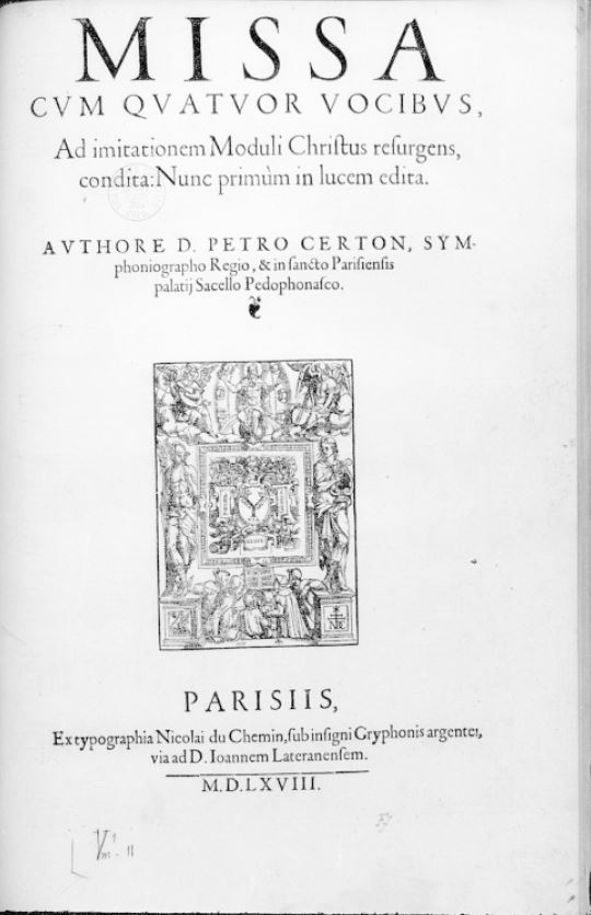 Title page of Pierre Certon, Missa Christus resurgens (Paris : Nicolas Du Chemin, 1568).